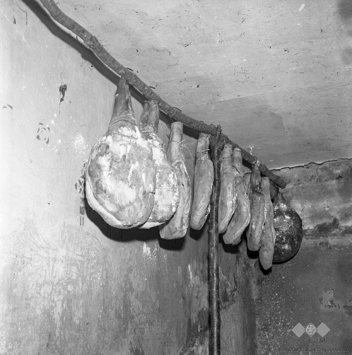 Štorje, pršut.